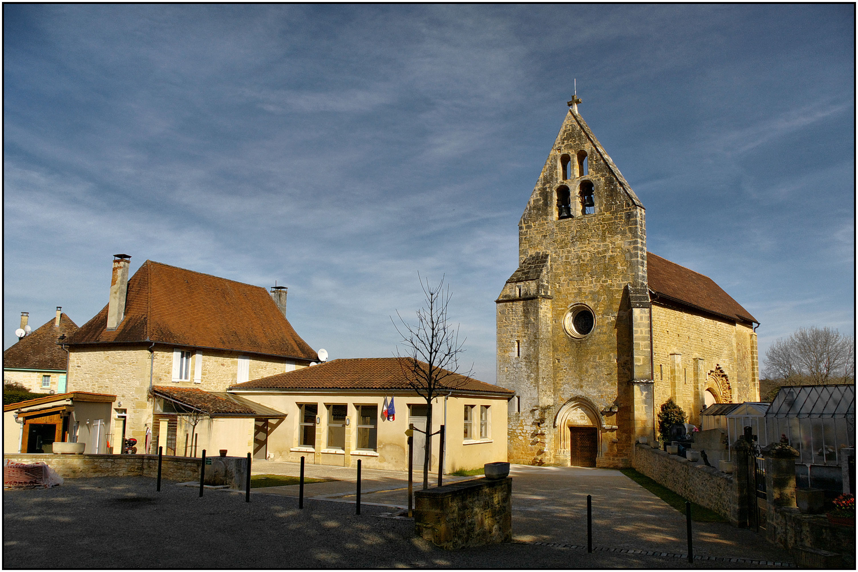 Place de Saint-Vincent-Le Paluel. L'église, la mairie et une partie du cimetière ayant figuré dans le film "Le Tatoué" de Denys de La Patellière (1968)